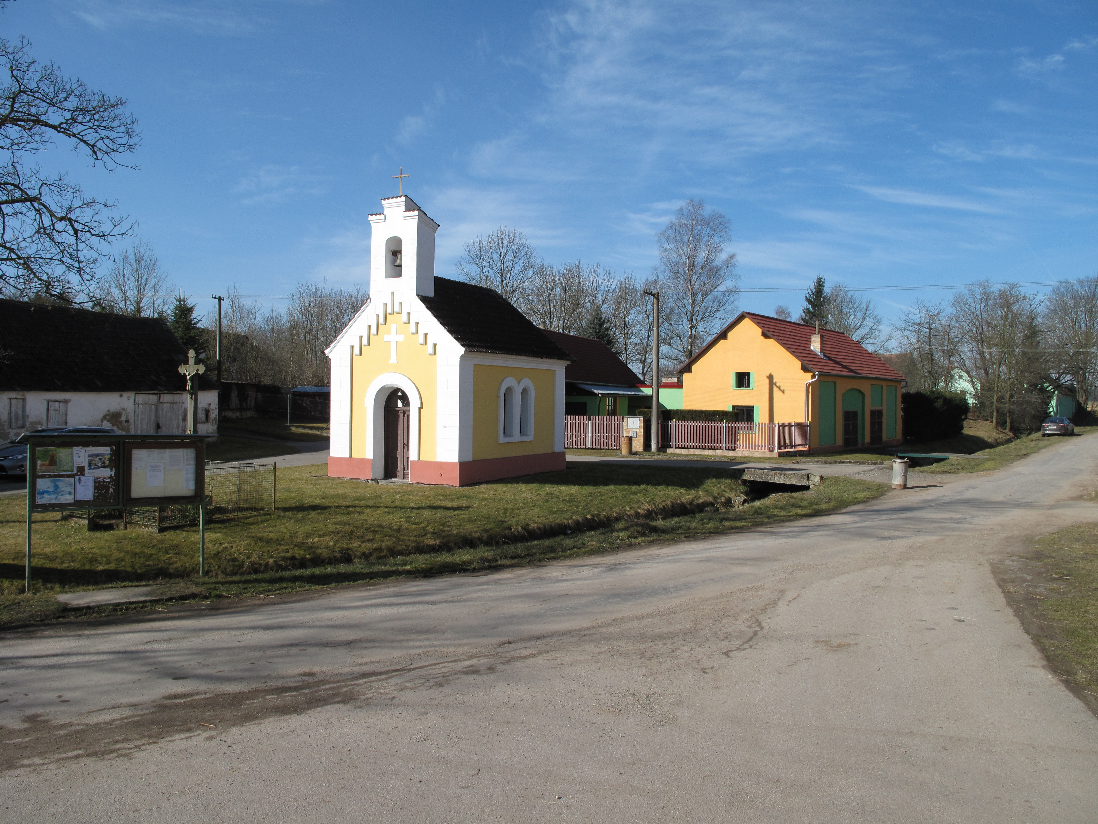 Kaplička v České Lhotě. Okres České Budějovice, Česká republika.